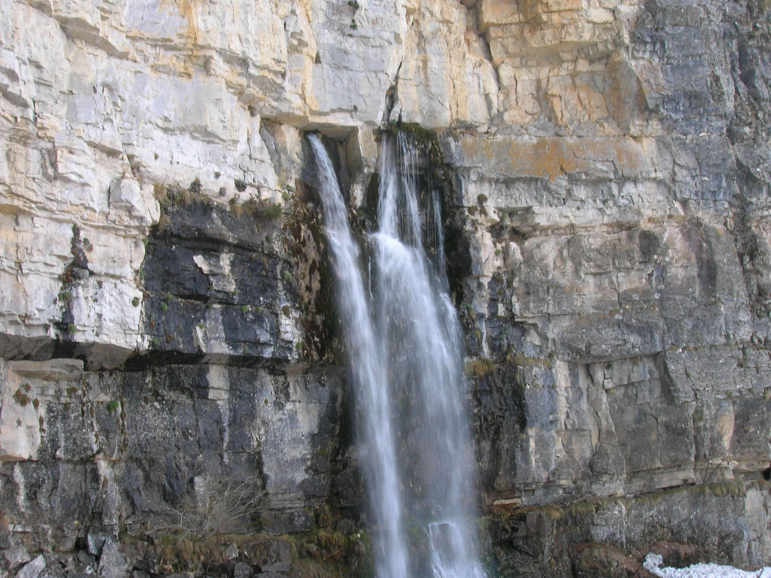 "Sorgenti del Pis" - Fiume Pesio (Cuneo, Piemonte, Italy)